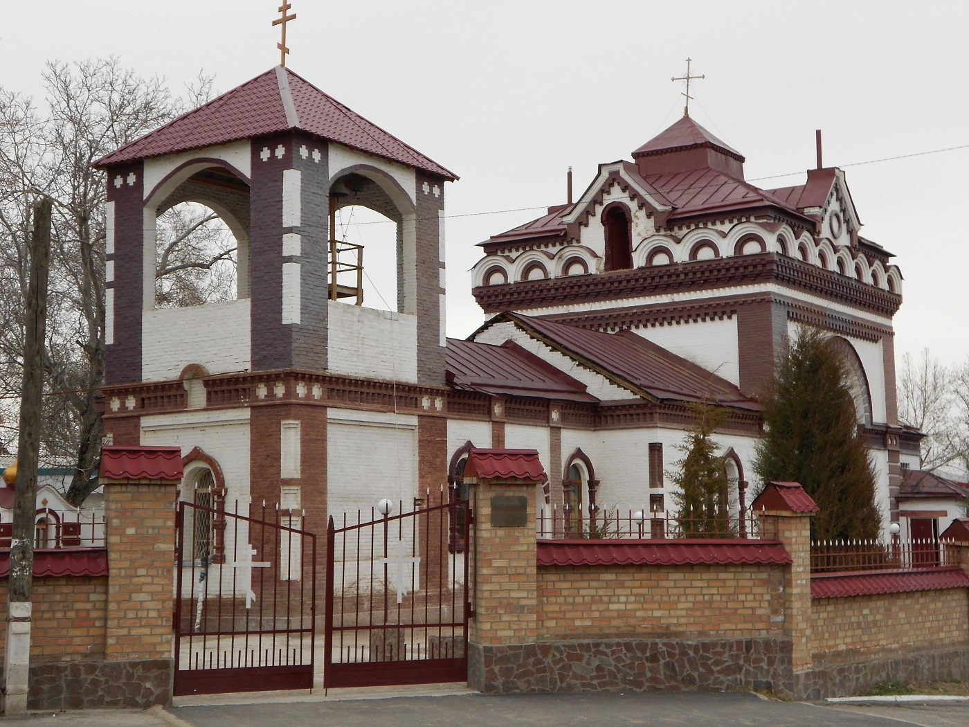 Свято-Троице-Георгиевский Чирчикский мужской монастырь расположен в городе Чирчик на территории Ташкентской и Узбекистанской Епархии Среднеазиатского митрополичьего округа.